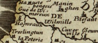 Wimille, sur la carte Oromansaci, et Gesoriacus Pagus in Morinis. : Evesché de Boulogne ou sont les Comté et seneschaussée de Boulenois. Balliage de Calais dans le Pays Reconquis. Souveraineté d'Ardres, etc. / par Nicolas Sanson d'Abbeville, 1656